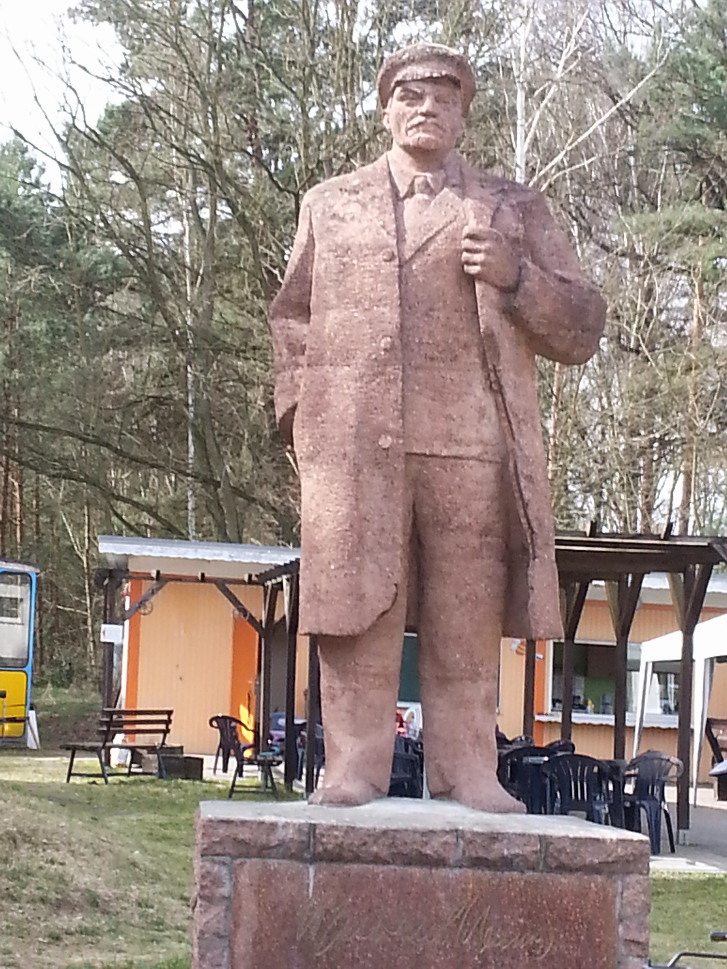 Lenindenkmal im Luftfahrtmuseum Finowfurt